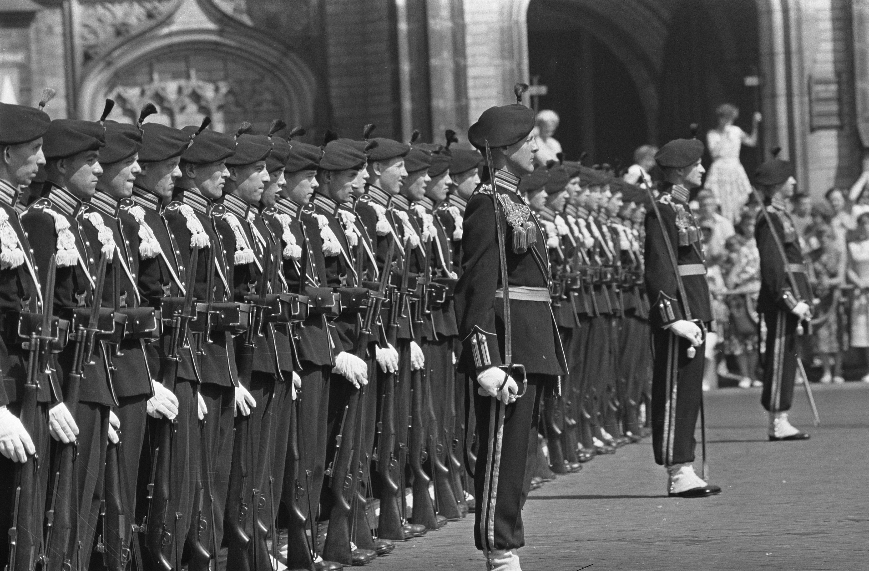 Collectie / Archief : Fotocollectie Anefo Reportage / Serie : Staatsbezoek koning Boudewijn 1959 Beschrijving : Staatsbezoek Koning Boudewijn , erewacht Dam Datum : 9 juli 1959 Locatie : Amsterdam, Noord-Holland Trefwoorden : militairen, staatsbezoeken Fotograaf : Fotograaf Onbekend / Anefo Auteursrechthebbende : Nationaal Archief Materiaalsoort : Negatief (zwart/wit) Nummer archiefinventaris : bekijk toegang 2.24.01.05 Bestanddeelnummer : 910-5046